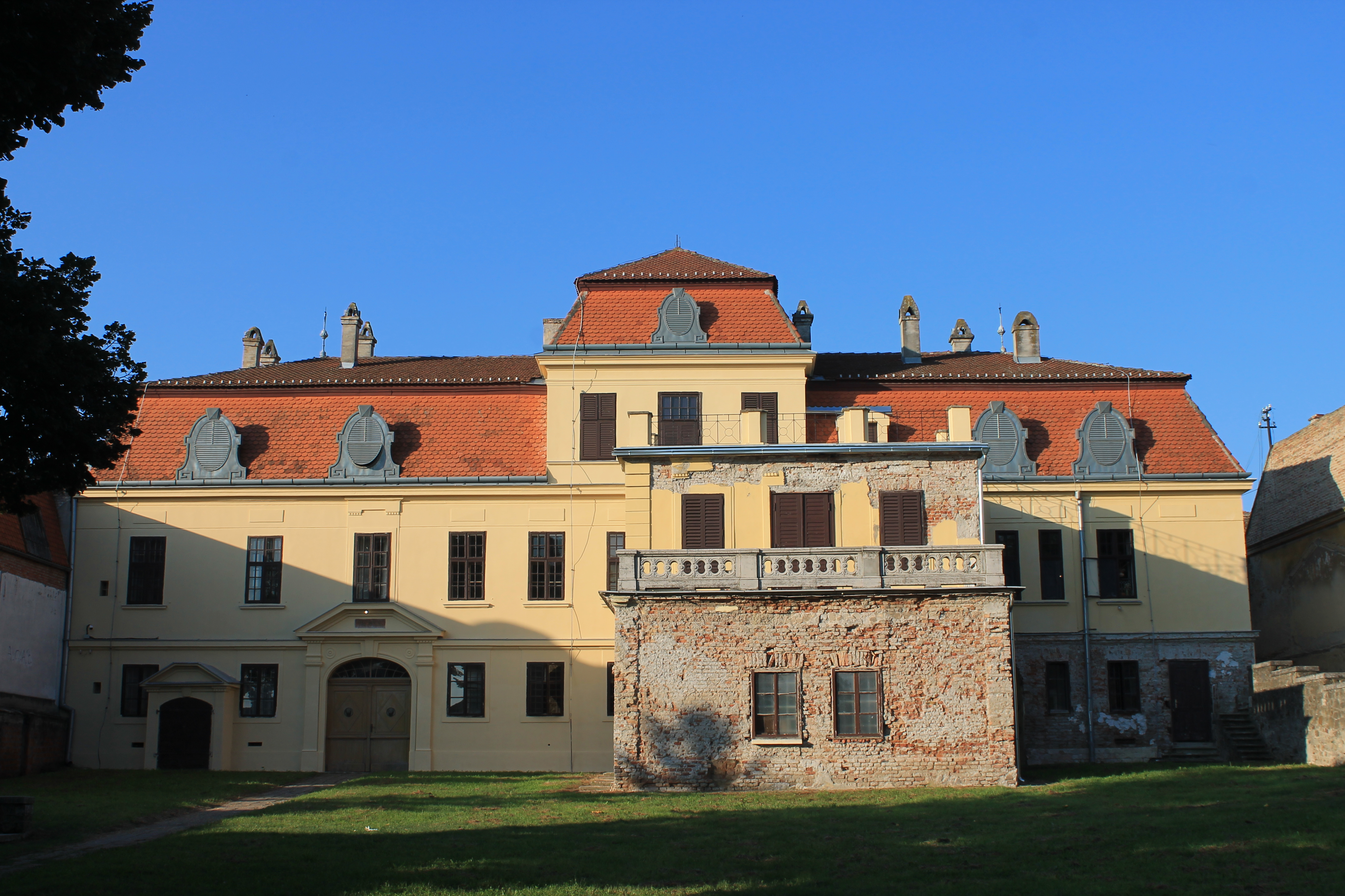 Palata Ilion